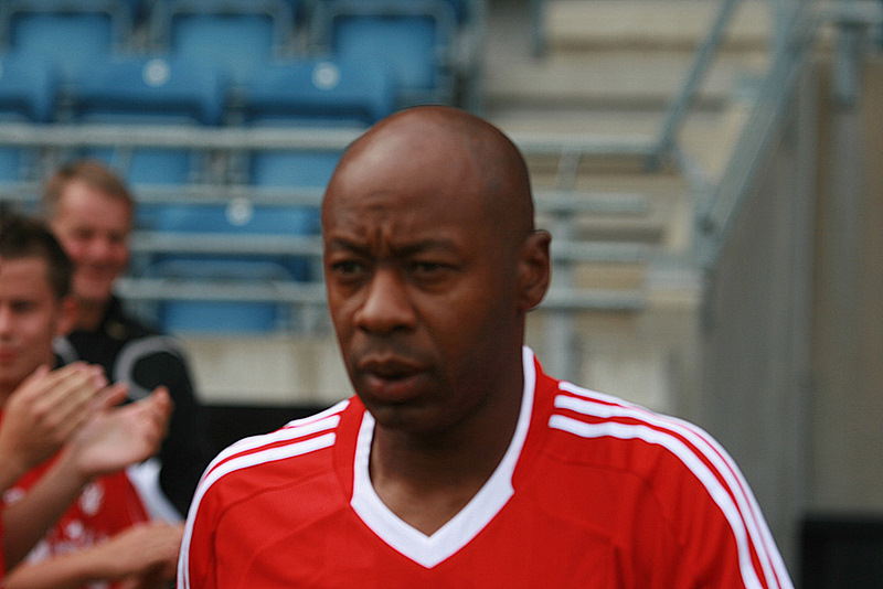 Mark Walters